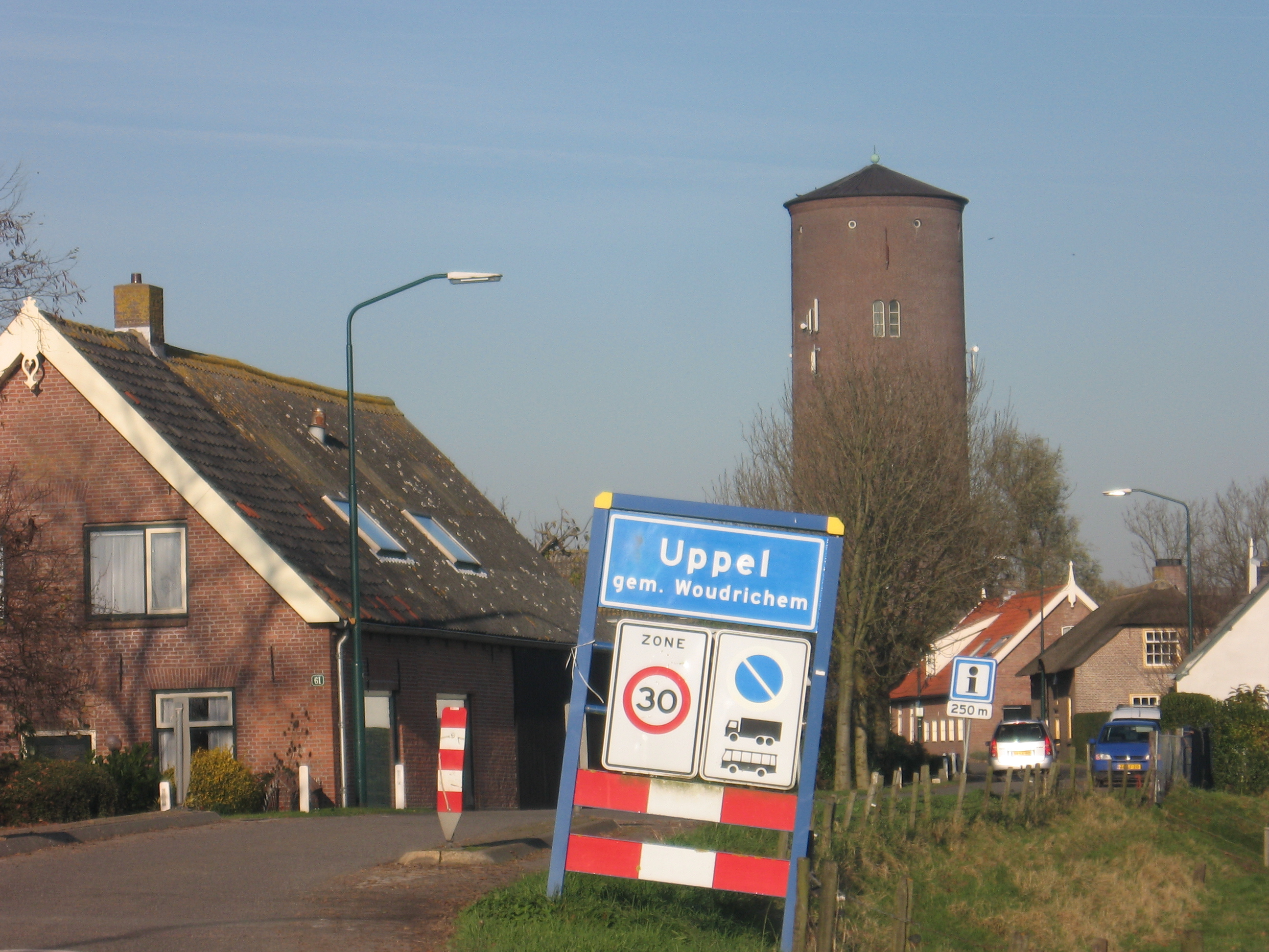 Uppel